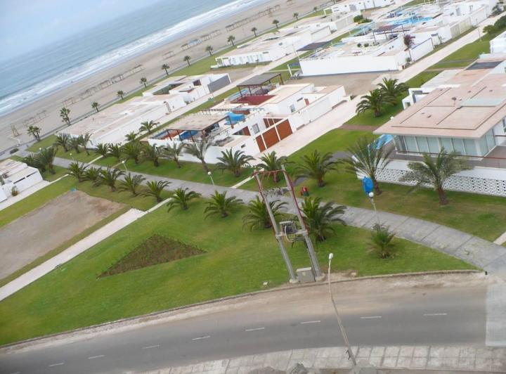 Urbanizacion exclusiva del distrito de Mejía en la región Arequipa